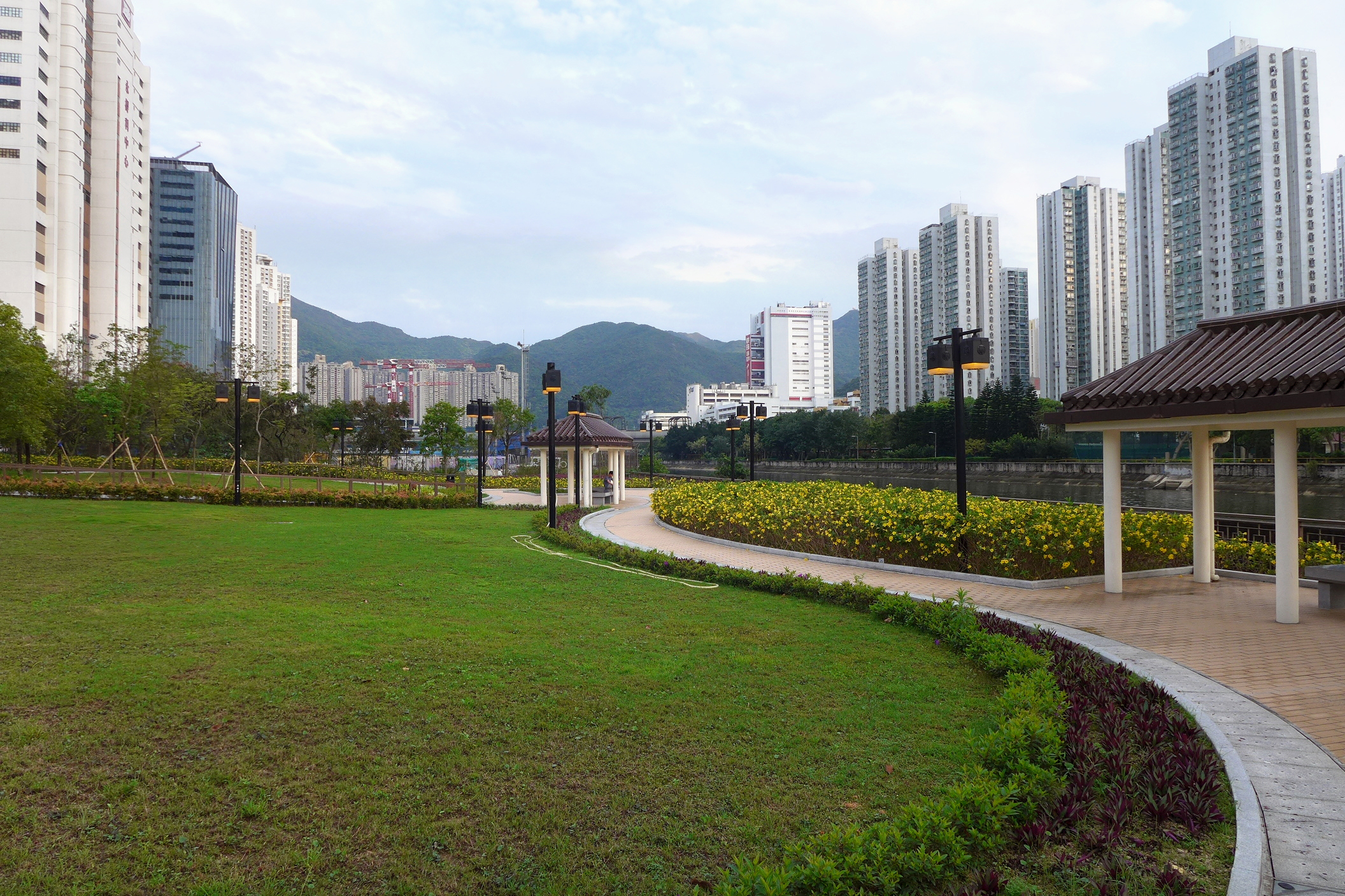 On Muk Street Park